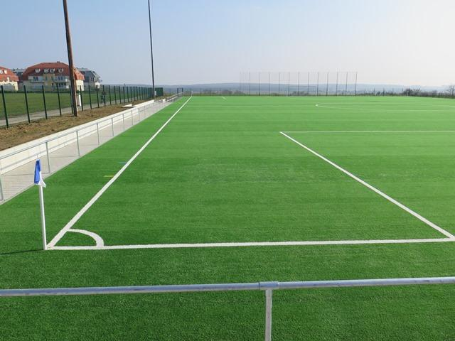 De fäerdege Projet an den "Ierzekaulen" (Perspektiv 2), Stade Albert-Kongs